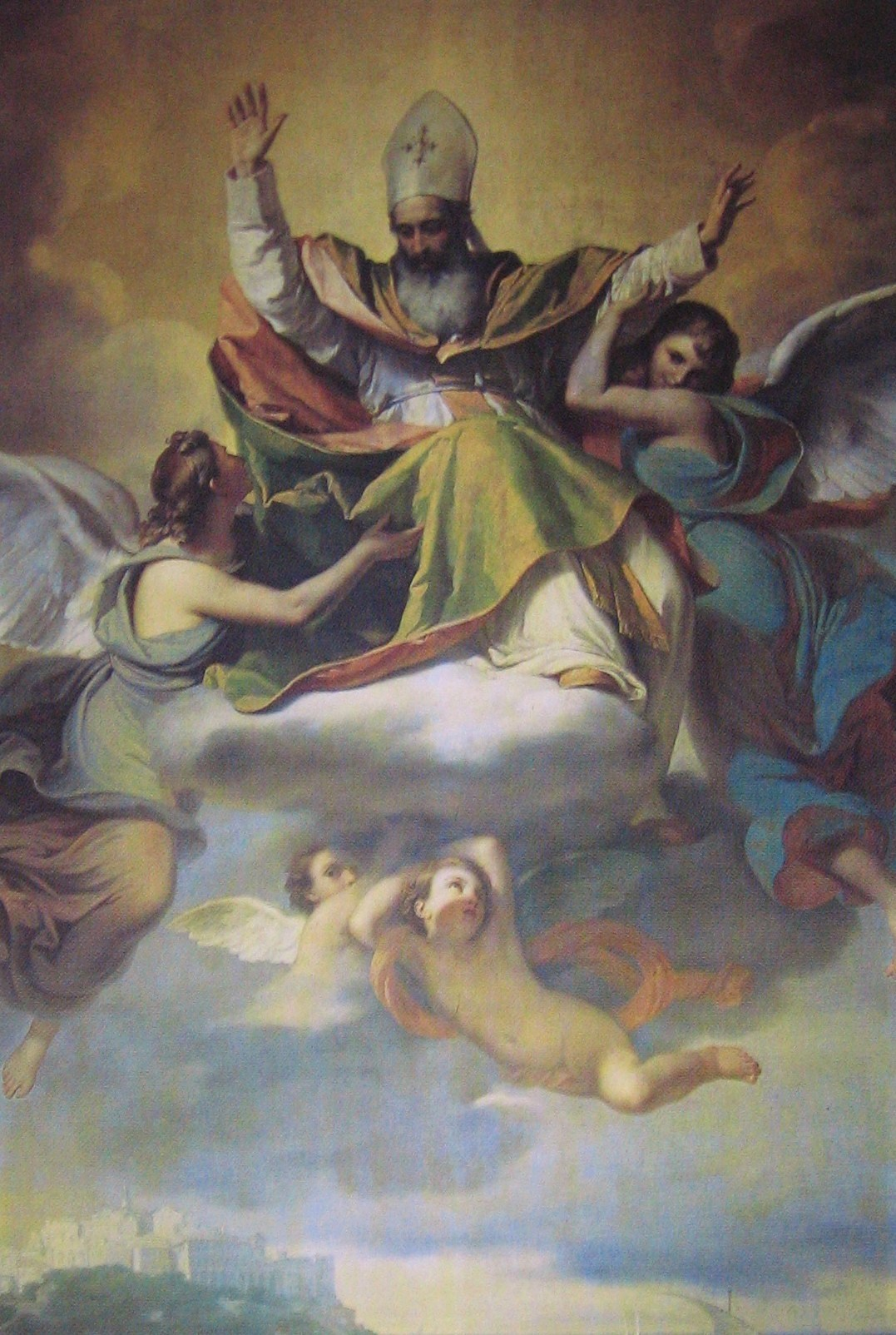 Francesco Coghetti, Apoteosi di Sant'Agostino, Duomo di Porto Maurizio, Imperia, Italy